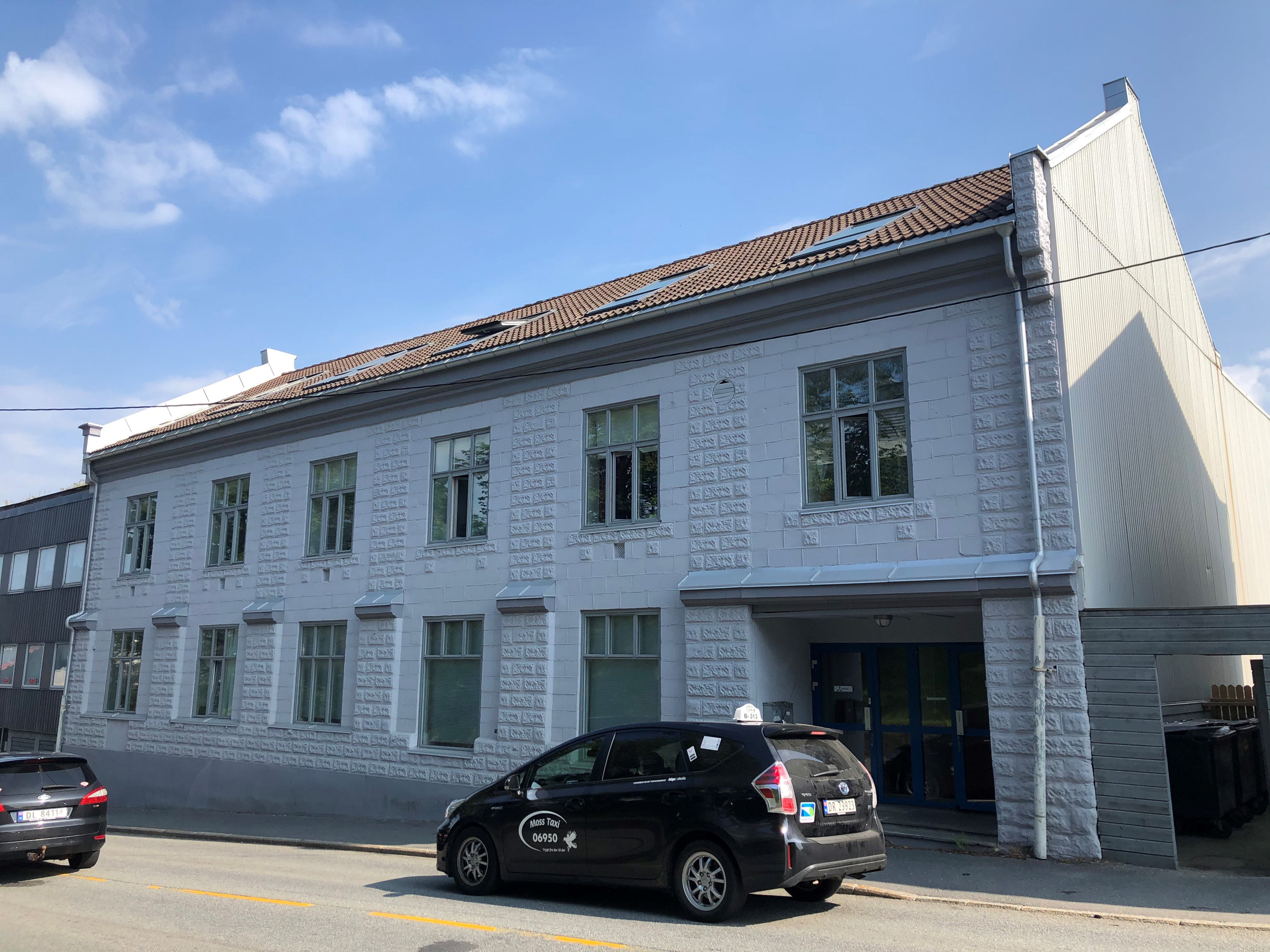 Bildet viser blokken Klostergata 6, det er et murhus med 2 etasjer og en bakgård, i bakgården er det søppelbøtter og en liten lekeplass. Bildet er tatt av privatpersonen Ludvig Andreassen.